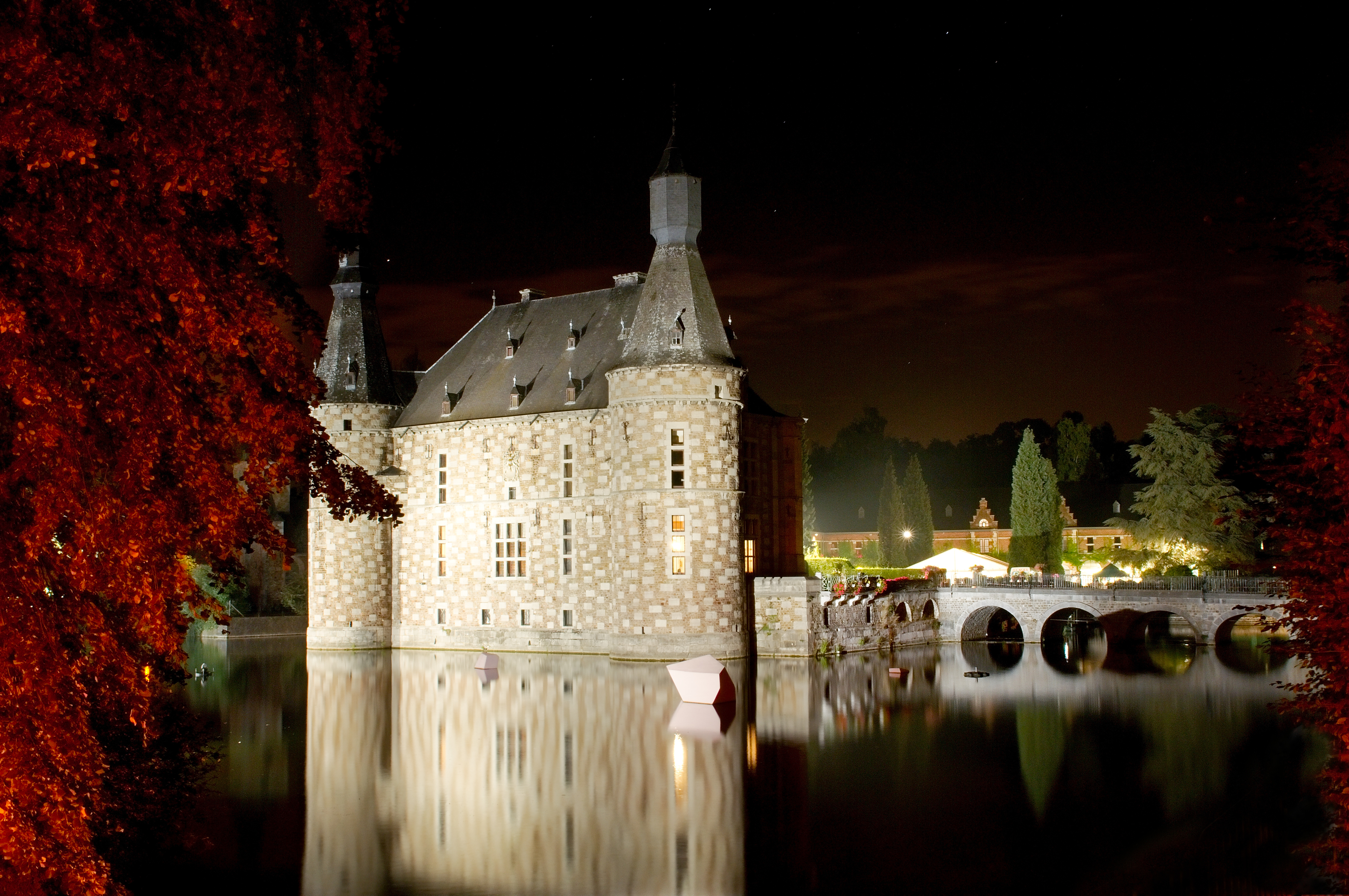 Chateau de Jehay